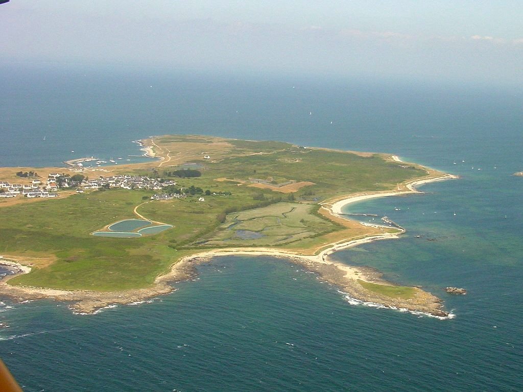 ile vue du ciel